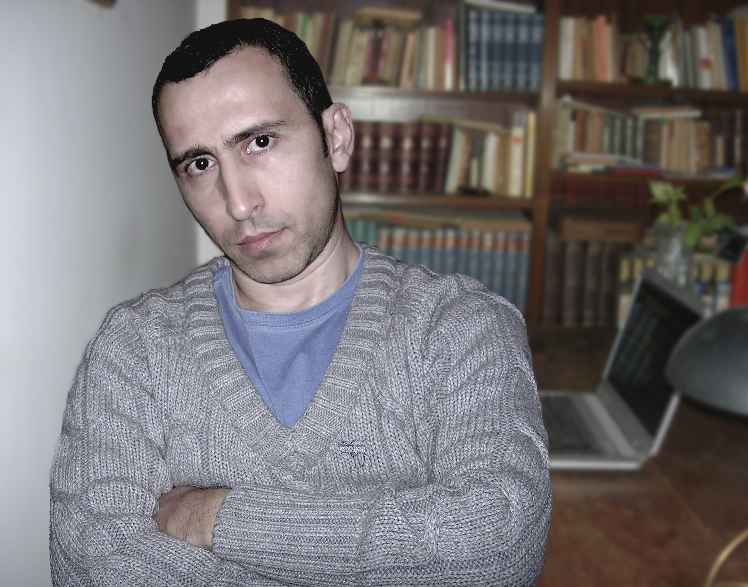 Escritor cubano David Mitrani Arenal en su estudio de Sorrento, Italia